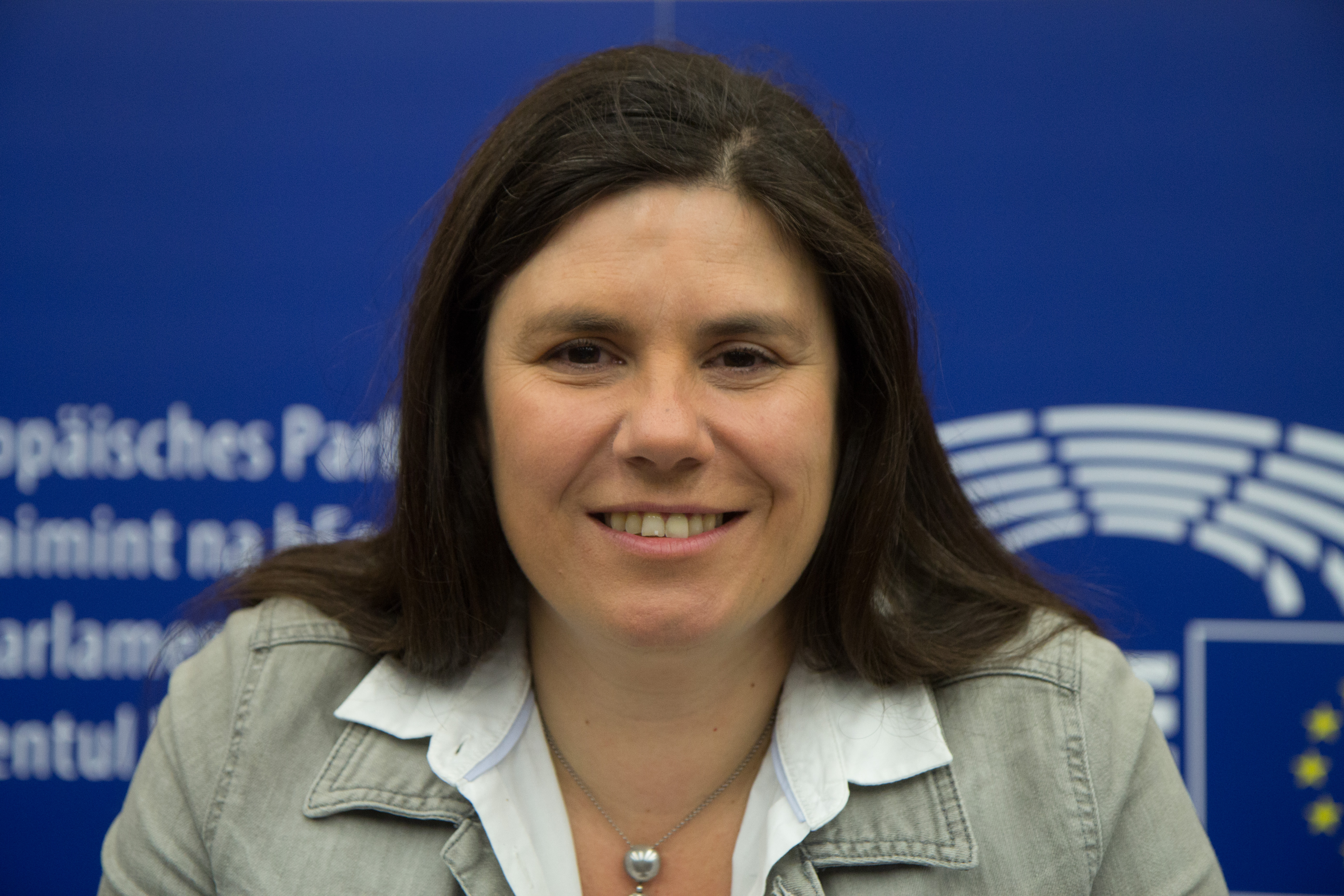 Sitzung des Europa Parlaments im Juli 2018 in Straßburg.